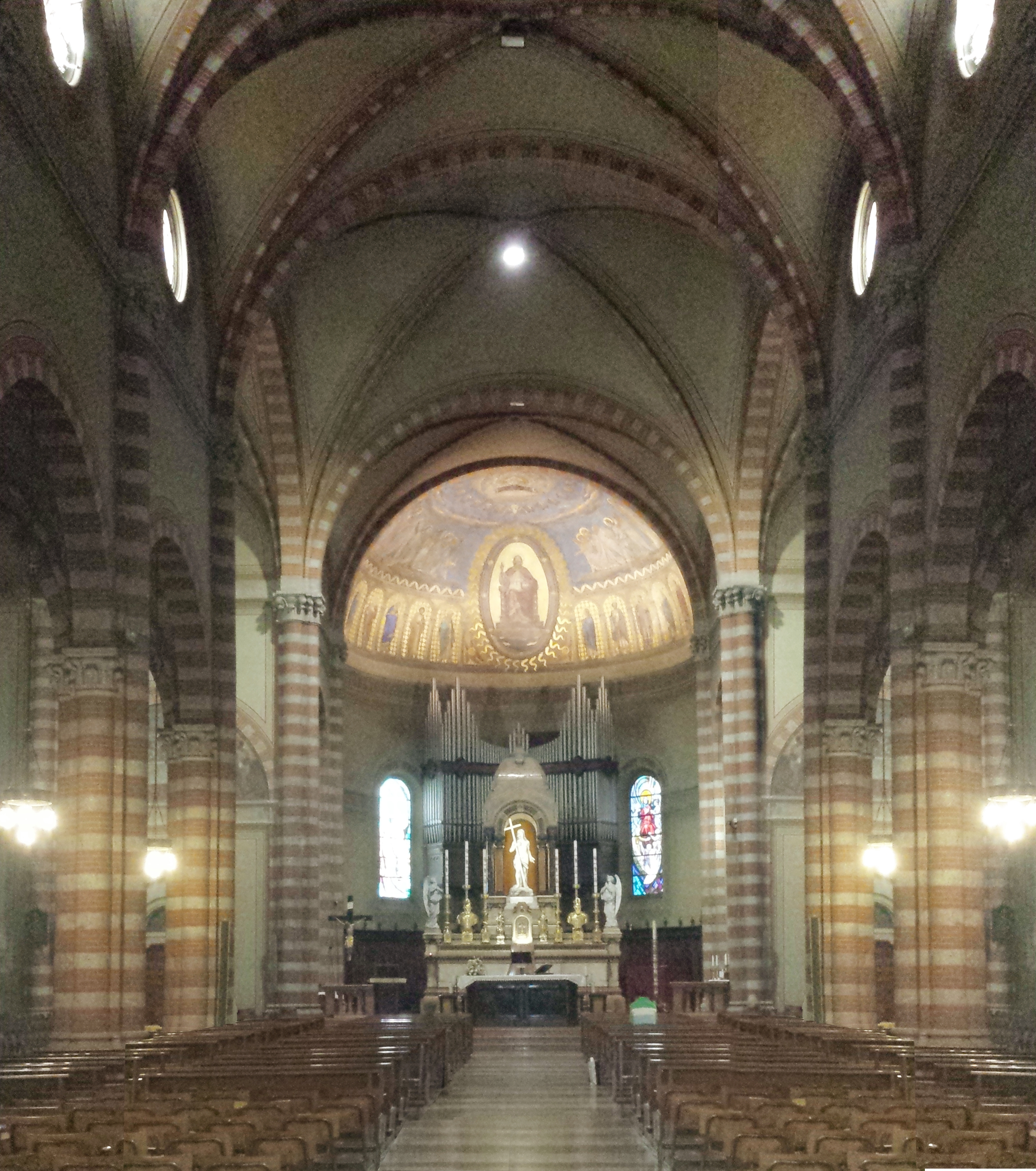 L'interno a tre navate e a pianta a croce latina della chiesa del Santissimo Redentore a Milano